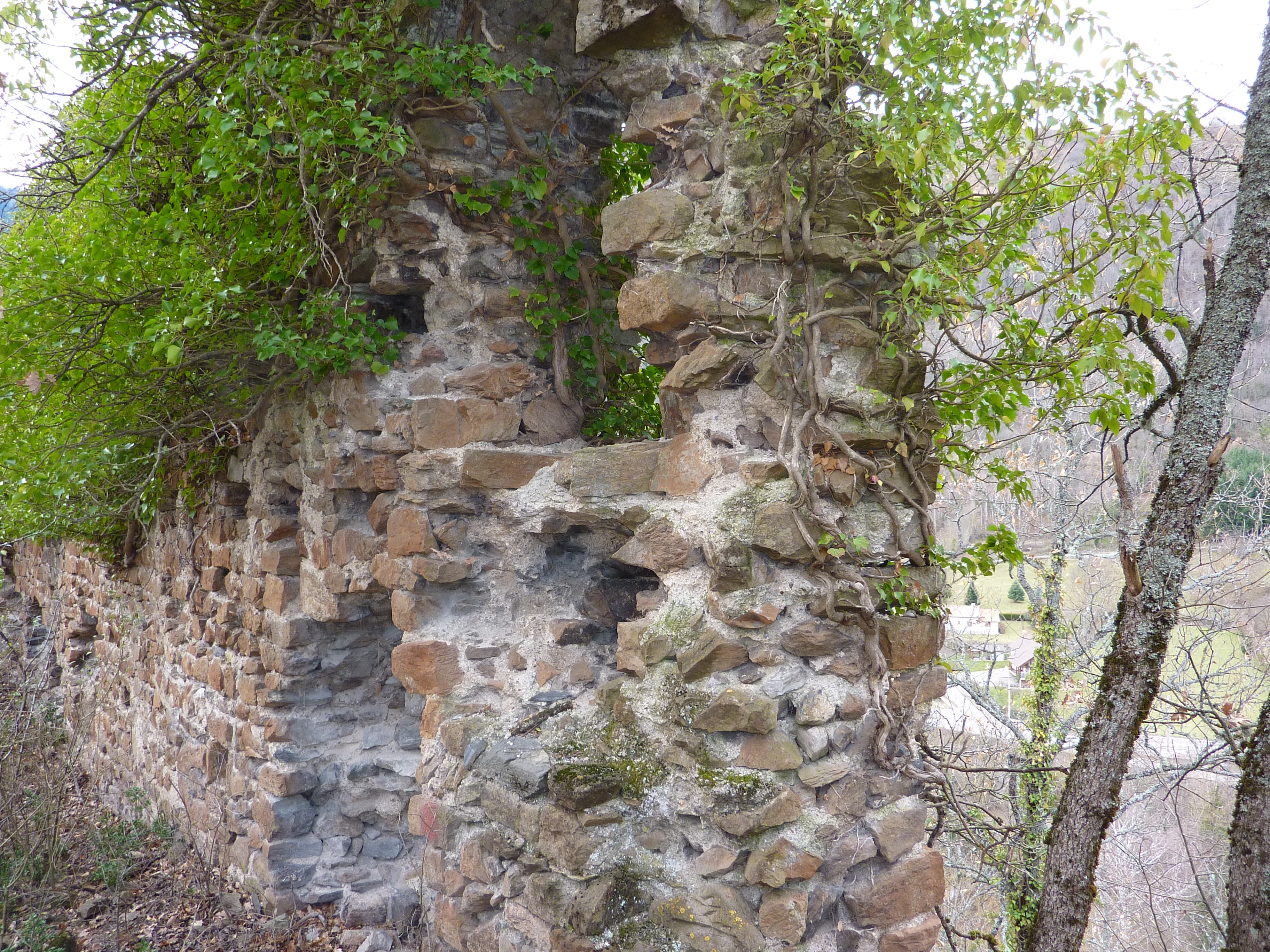 Vue du château fédal